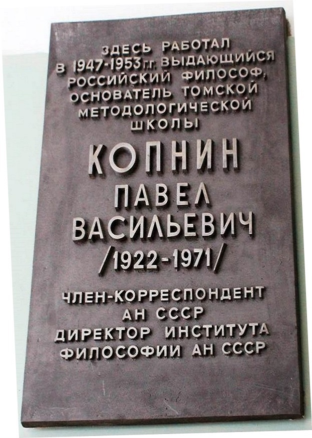 Мемориальная доска Копнину Павлу Васильевичу, ТГУ